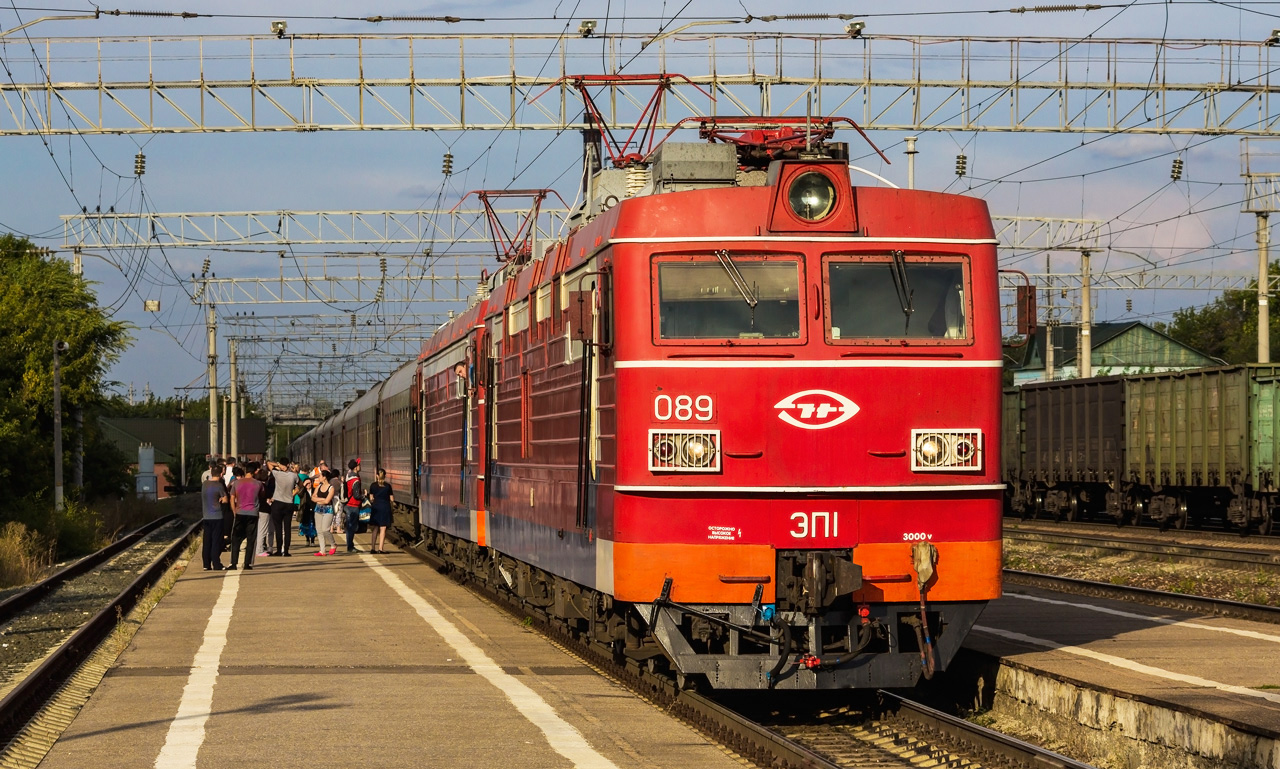 Электровозы ЭП1-089+210 с пассажирским поездом на станции Сызрань-Город